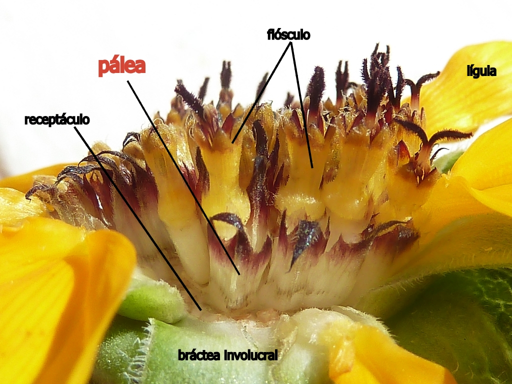 Helianthus sp. ex. gr. bolanderi : Anatomía del capítulo (se han quitado unas cuantas flores para una mejor visión) - Paseo de la Constitución, cultivado/ornamental, Águilas, Provincia de Murcia (España).